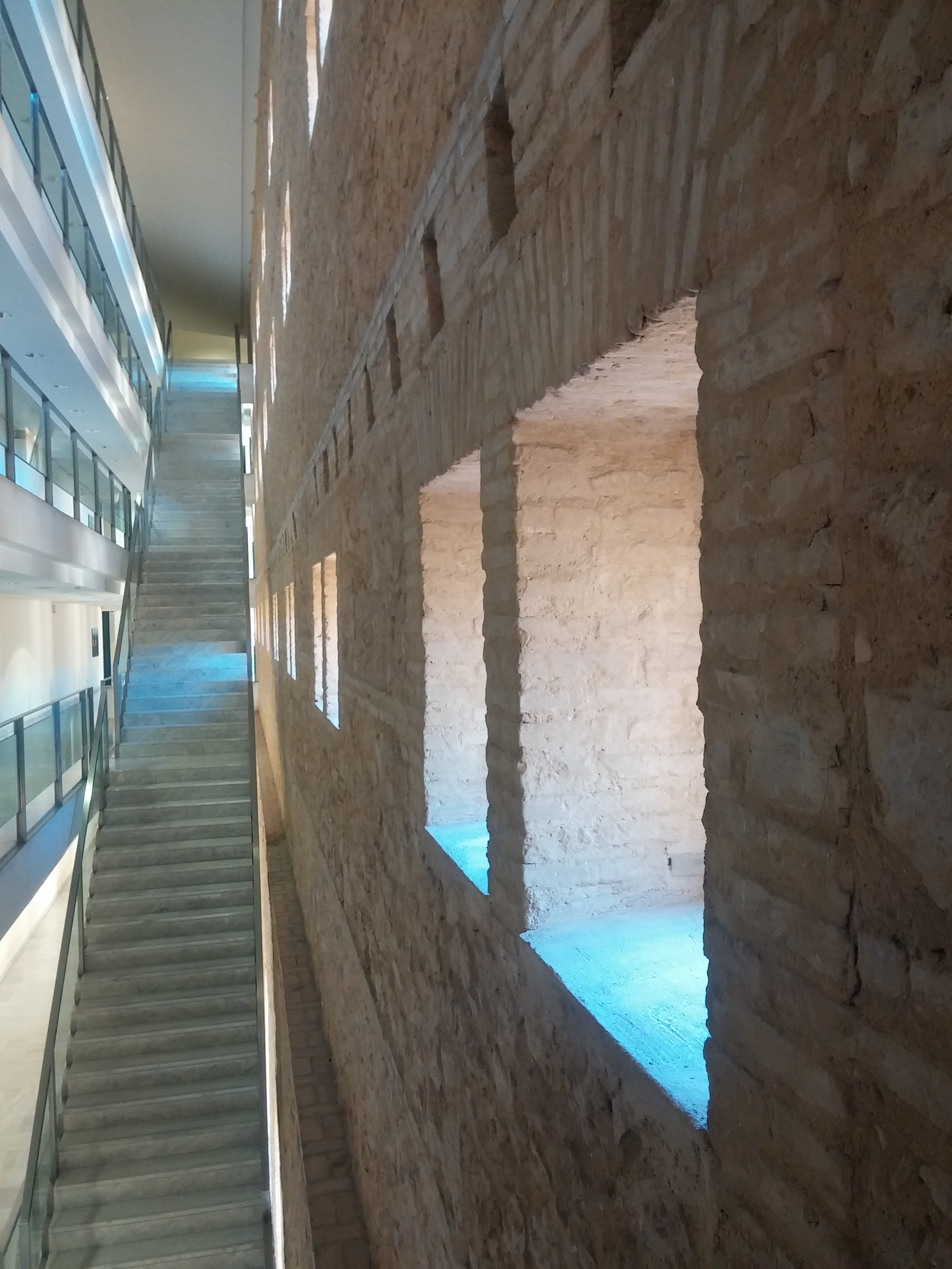 Escala interior que dóna al pati nord